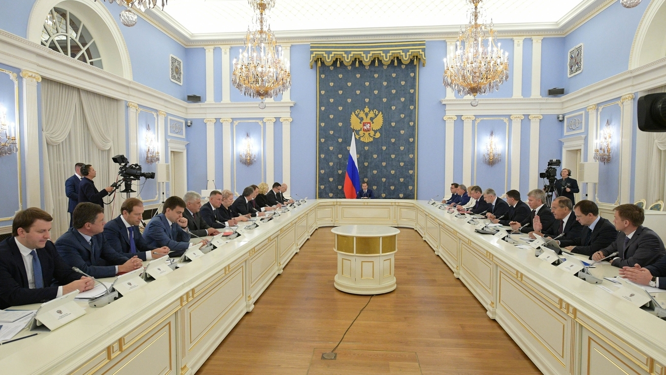 Заседание правительства России 6 июня 2018 года